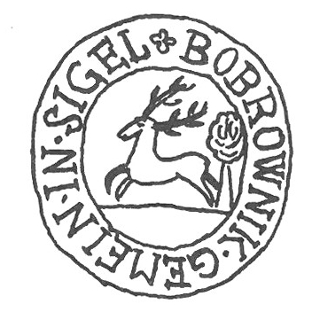 Toto pečetidlo jsem dostala naskenované z Hlučínského muzea. Bohužel nevím z jaké knihy to je.